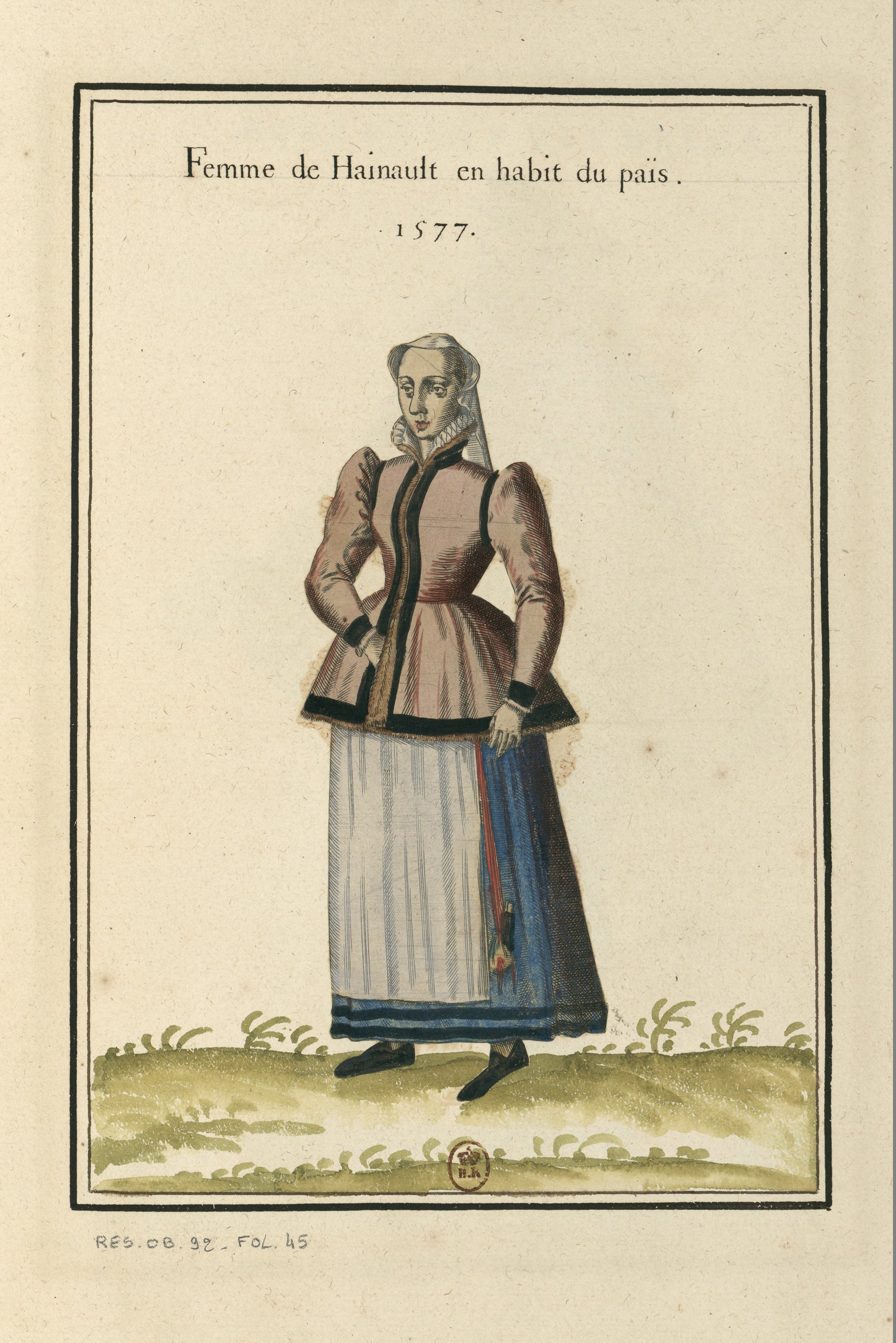 Ensemble de gravures de costumes des Pays-Bas du XVIe siècle